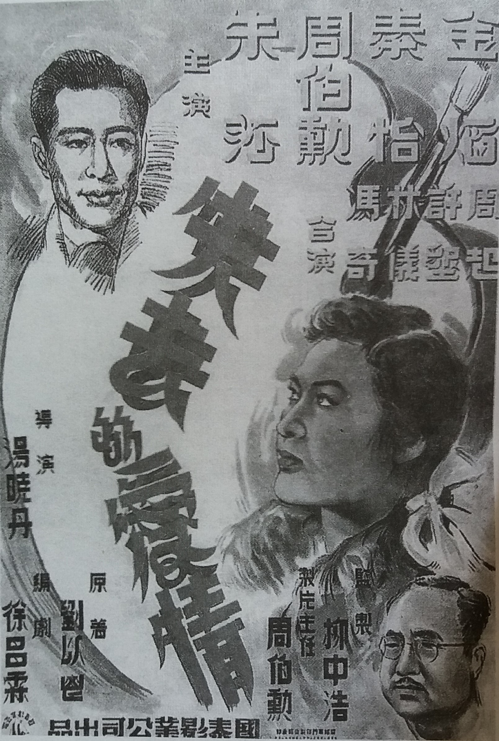 失去的爱情海报